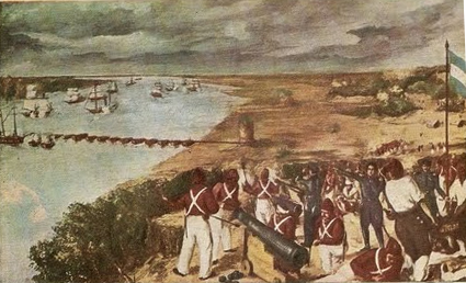 bataille navale franco anglaise contre l'Argentine à vuelta de obligado 1845